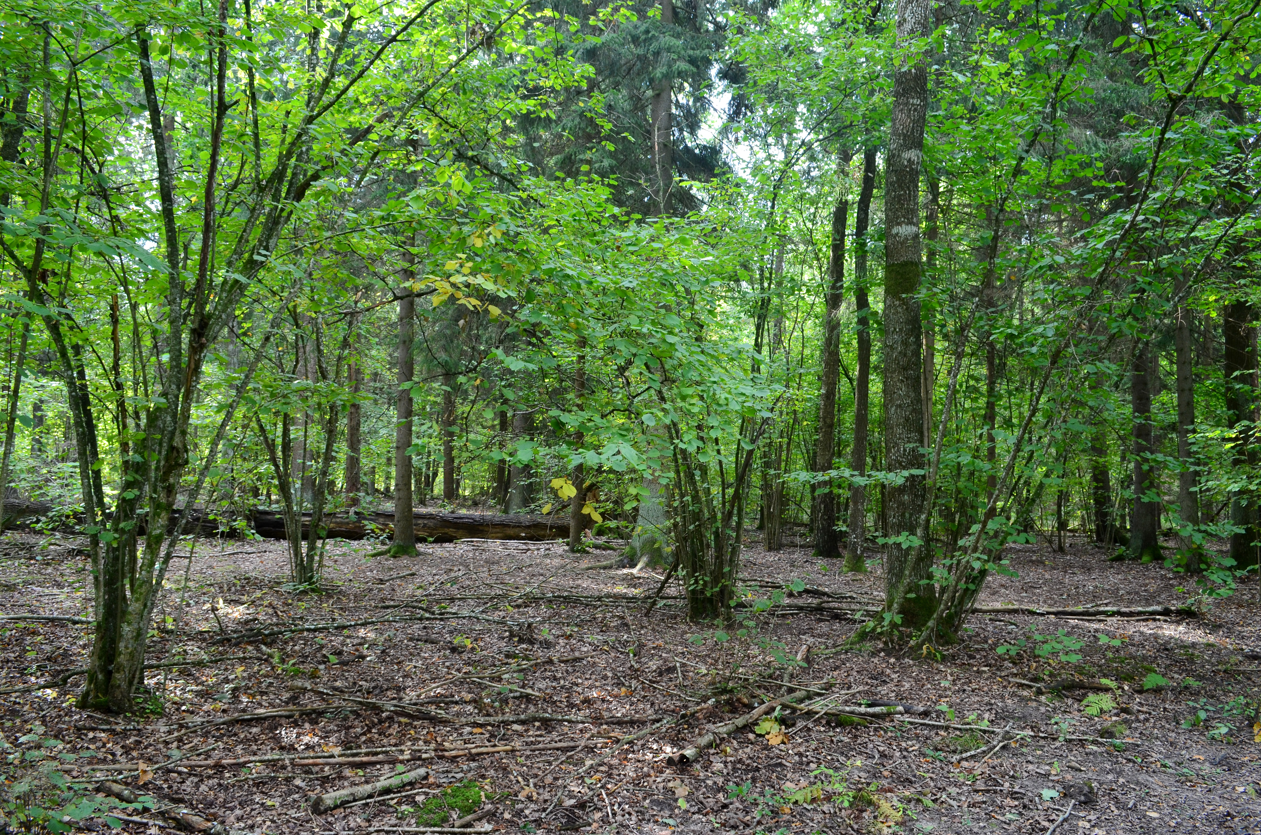 Dovydų miško botaninis draustinis, Lančiūnavos miškai, Kėdainių raj.